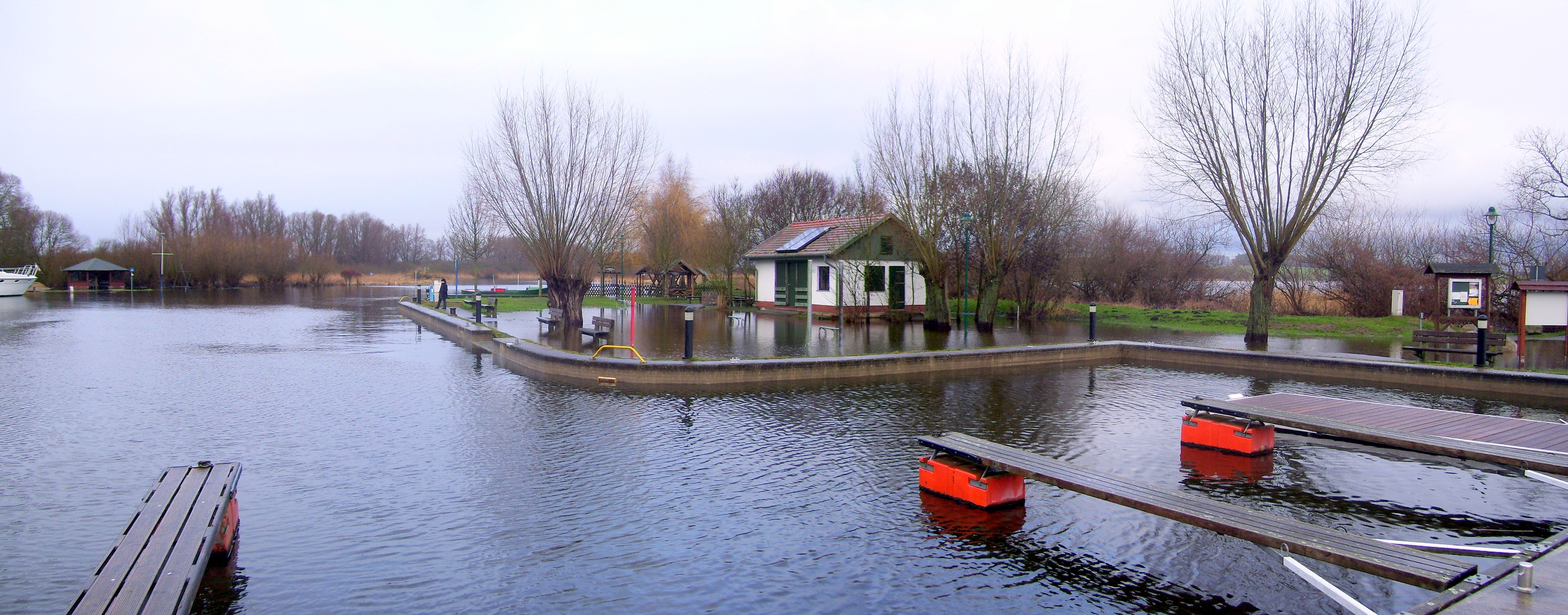 Verchen, Bootsanleger an der Peene gegenüber von Aalbude bei Hochwasser